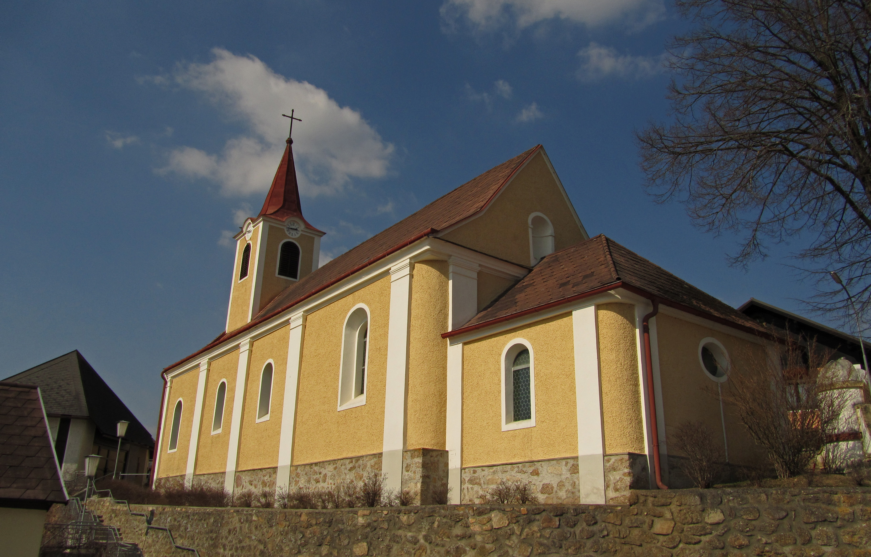 Kath. Pfarrkirche hl. Antonius von Padua in Jagenbach